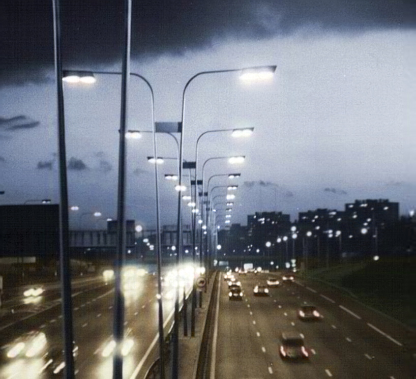 France - Seine Saint Denis - Romainville - Autoroute A3 avant couverture (image noir et blanc colorisée)